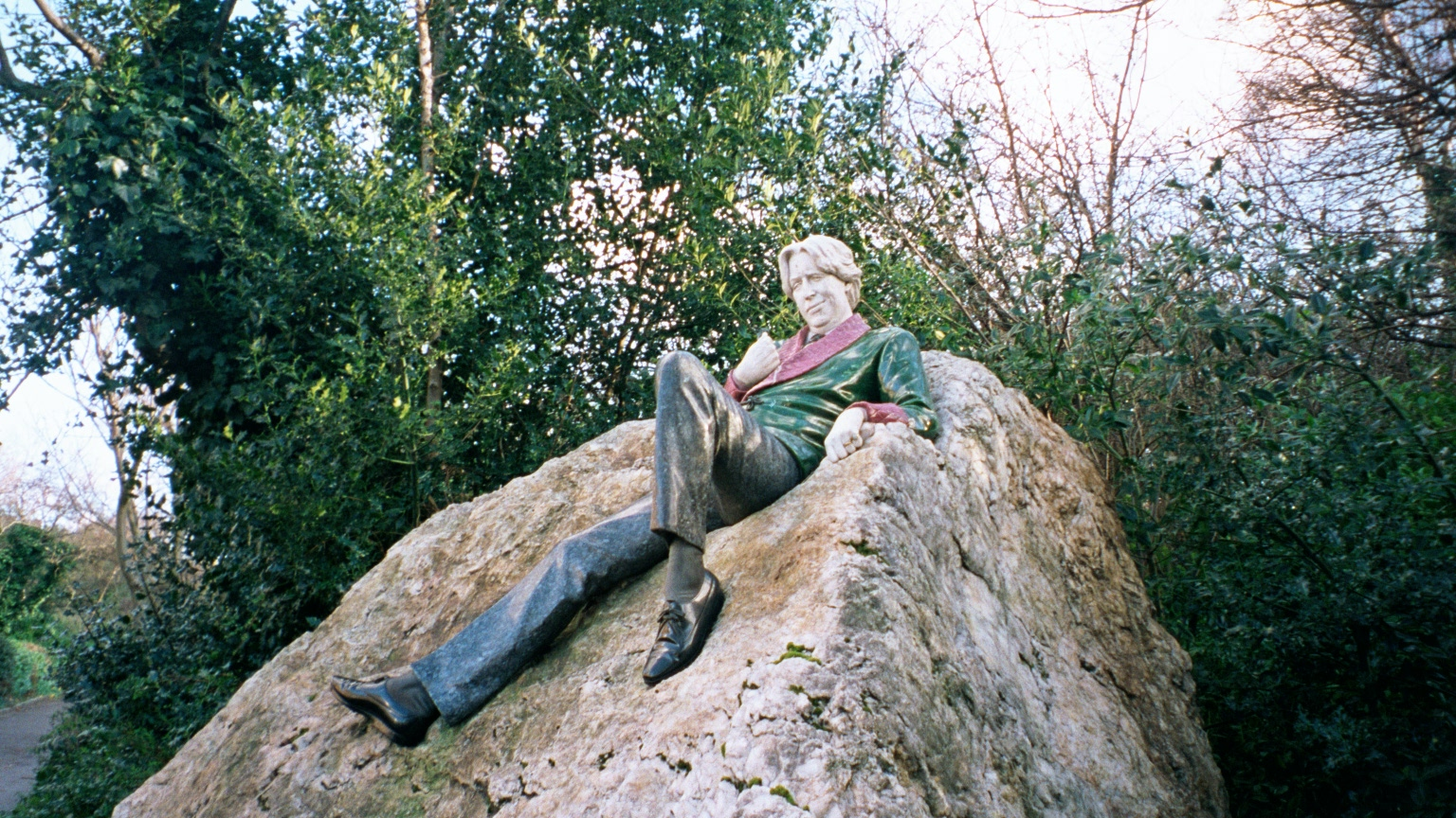 Eine Satue von Oscar Wilde, sitzend auf einem Felsen. Merrion Square, Dublin